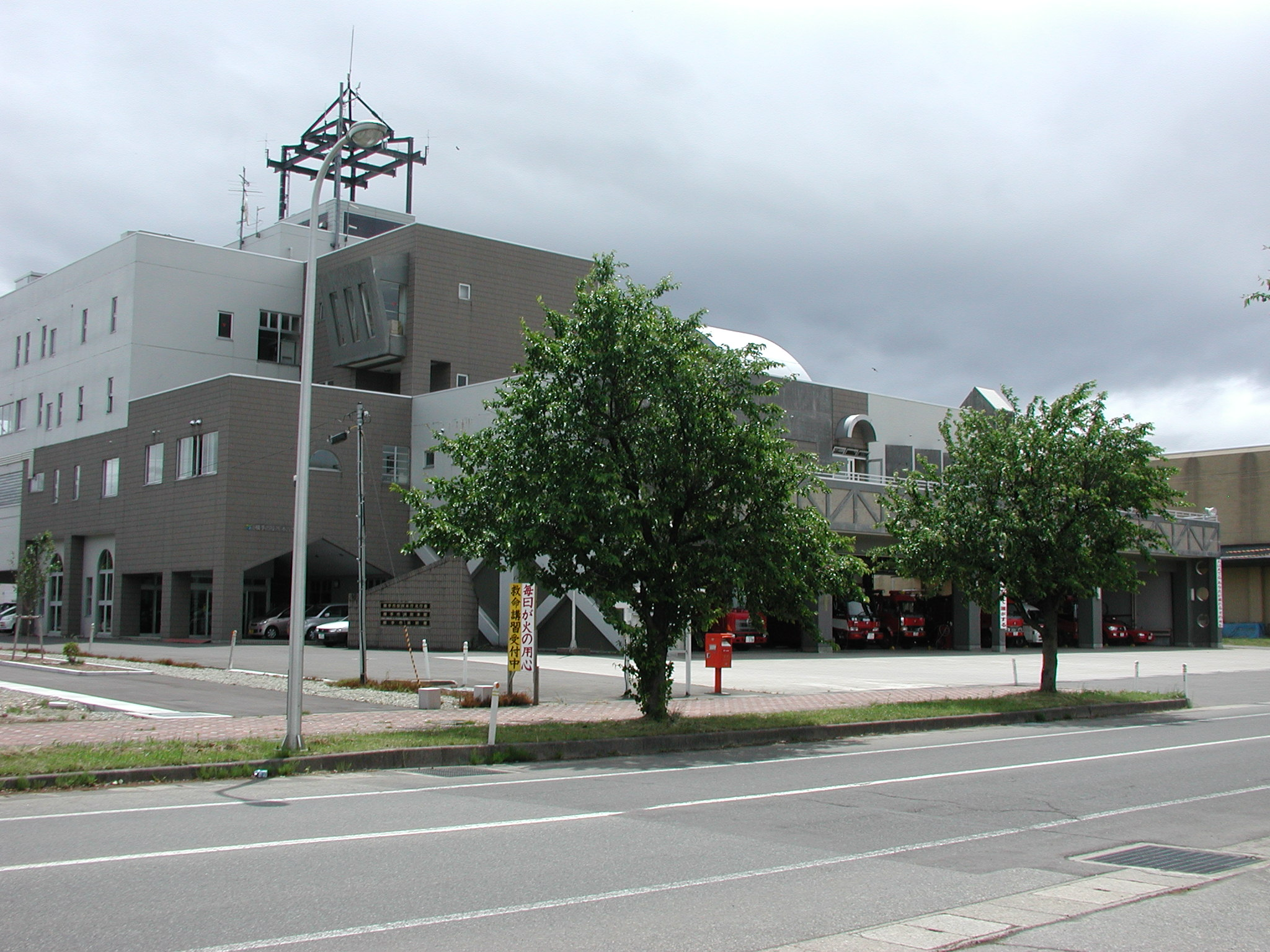 横手市役所 本庁北庁舎 横手市消防本部 横手市消防署